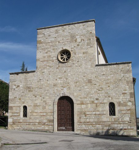 Esterno della Chiesa di San Martino di Tours di Nereto (Teramo)